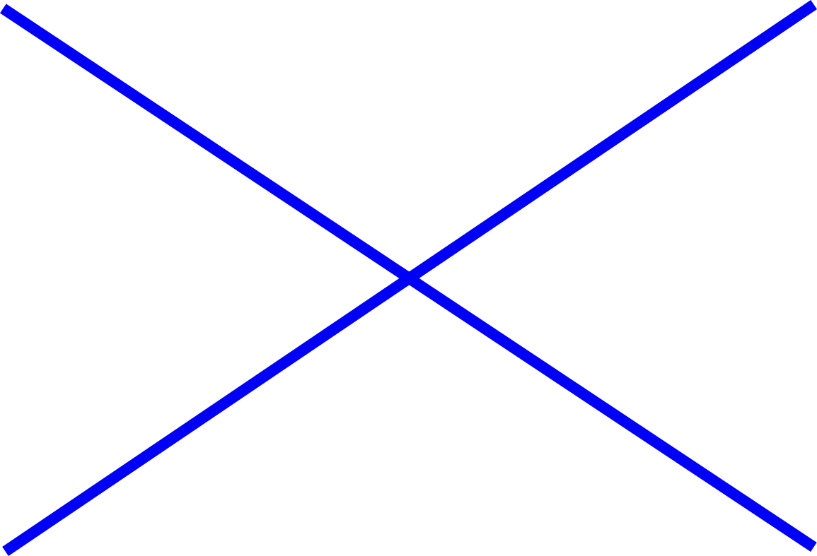 שני ישרים נחתחים